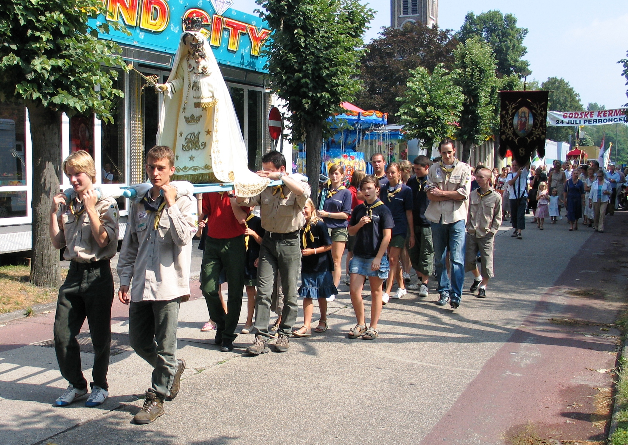 Processie in Godsheide